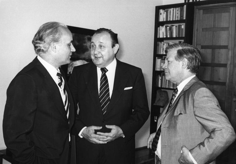 Bundeskanzler Helmut Schmidt überreicht Bundesminister Matthöfer das Bundesverdienstkreuz